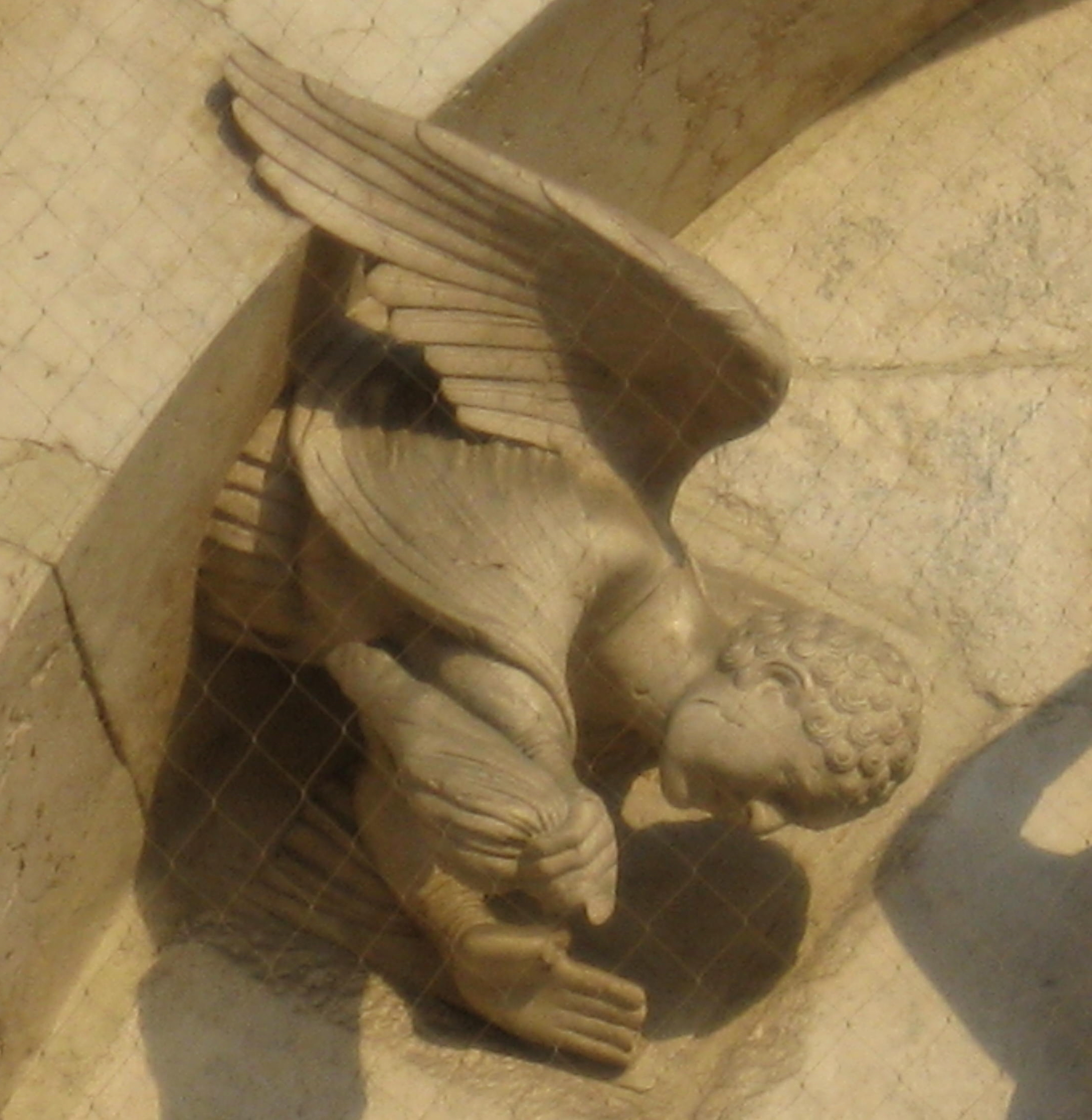 Perkele, Angelo che appare in sogno ai Magi